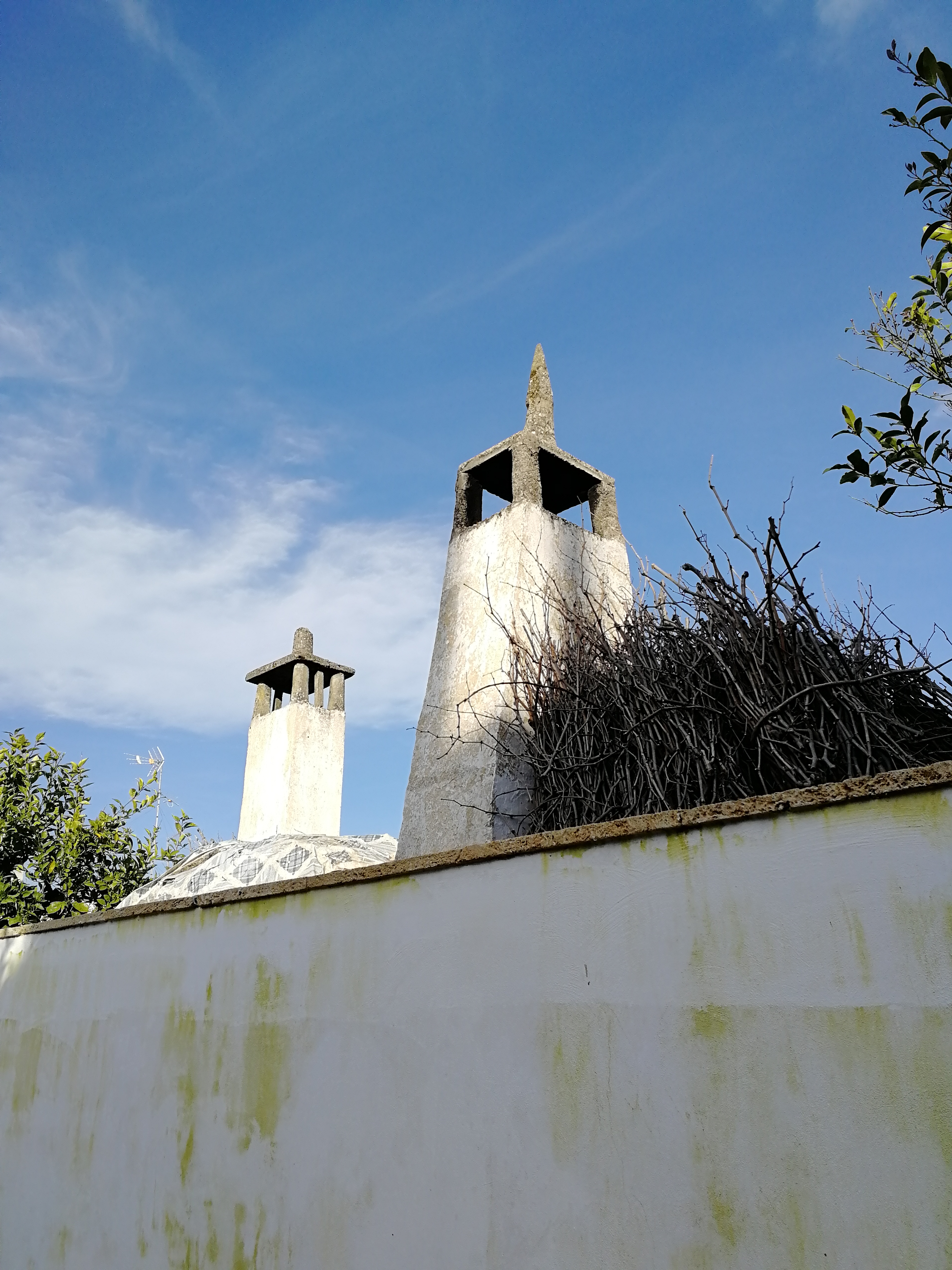 Caminetti